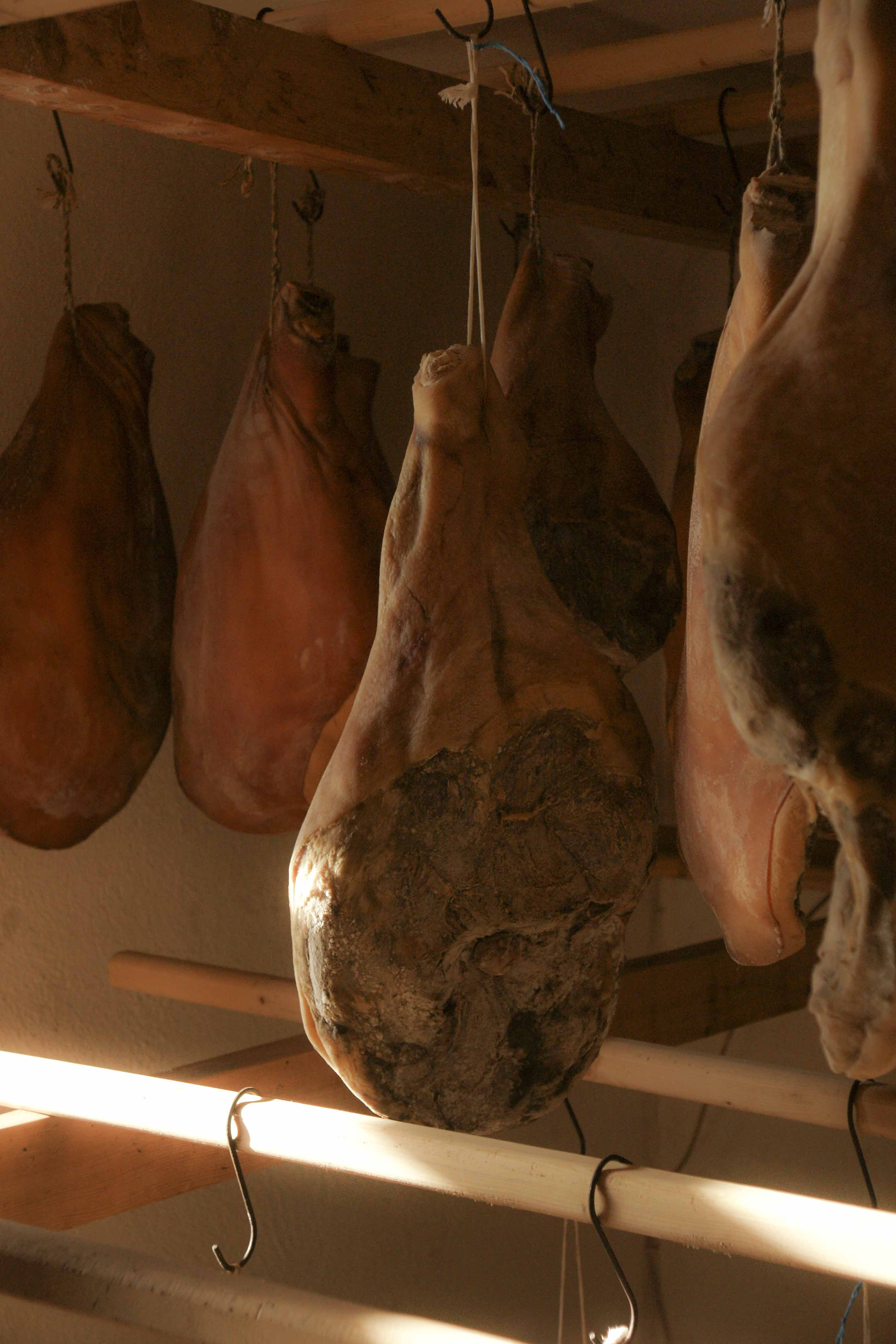 Herstellung von Trockenfleisch nach traditioneller Methode, Parpan, Kanton Graubünden Trockenfleisch